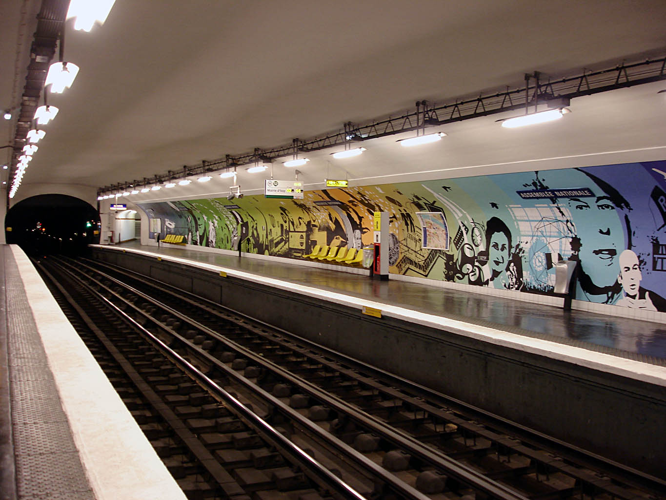 Station Assemblée nationale, de la ligne 12 du métro de Paris, France.